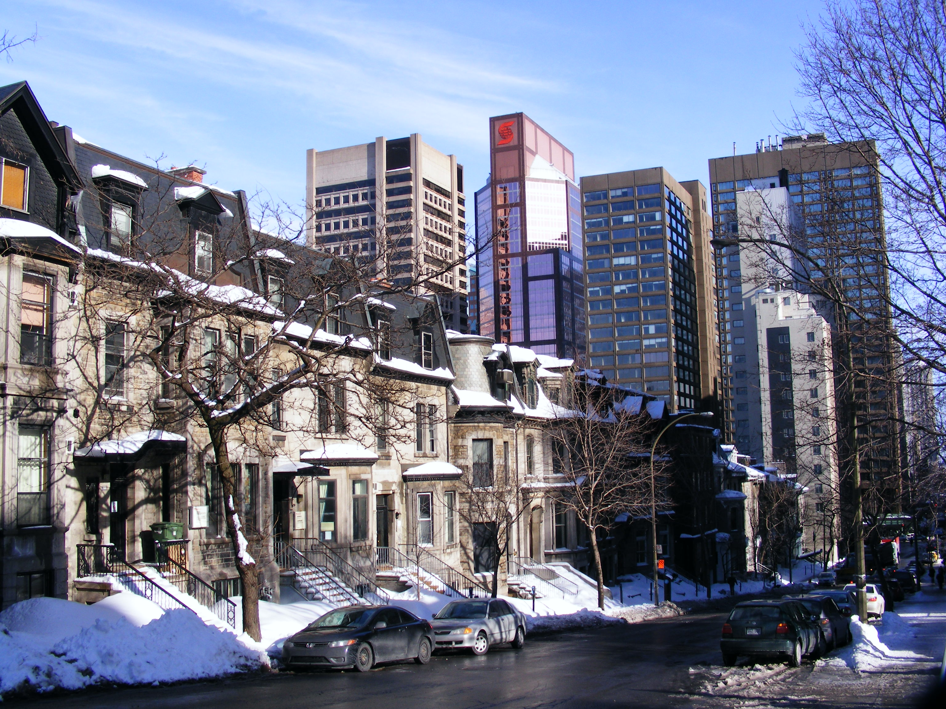 centre de la petite enfance McGill